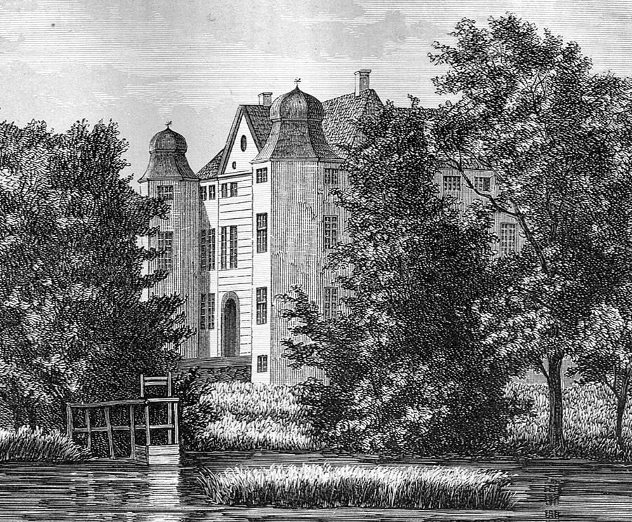 Sandholt er en gammel hovedgård, som nævnes første gang i 1434. Sandholt ligger i Sandholts Lyndelse Sogn, Sallinge Herred, Broby Kommune. Hovedbygningen er opført i 1516